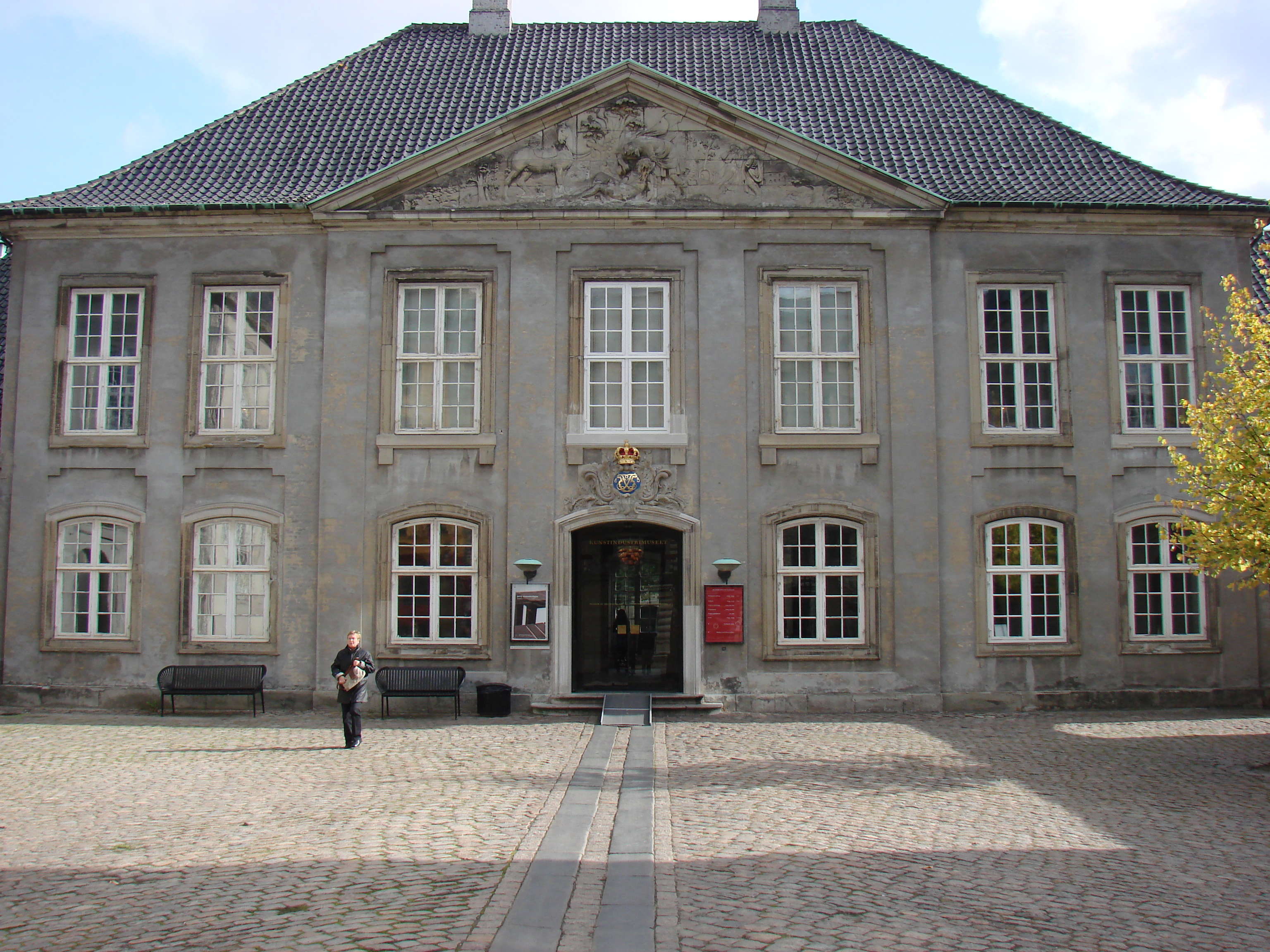 Haupteingang des Kunstindustrimuseet Kopenhagen.